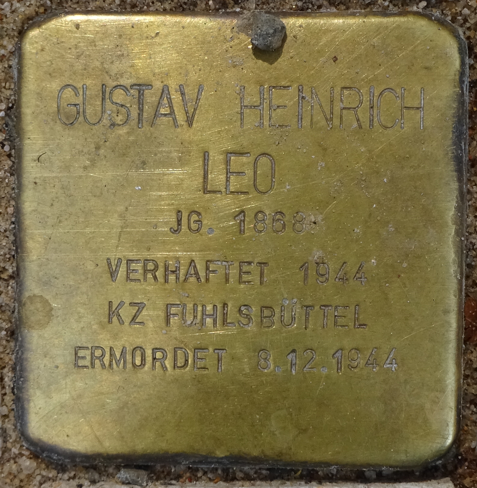 Stolperstein für Gustav Heinrich Lero